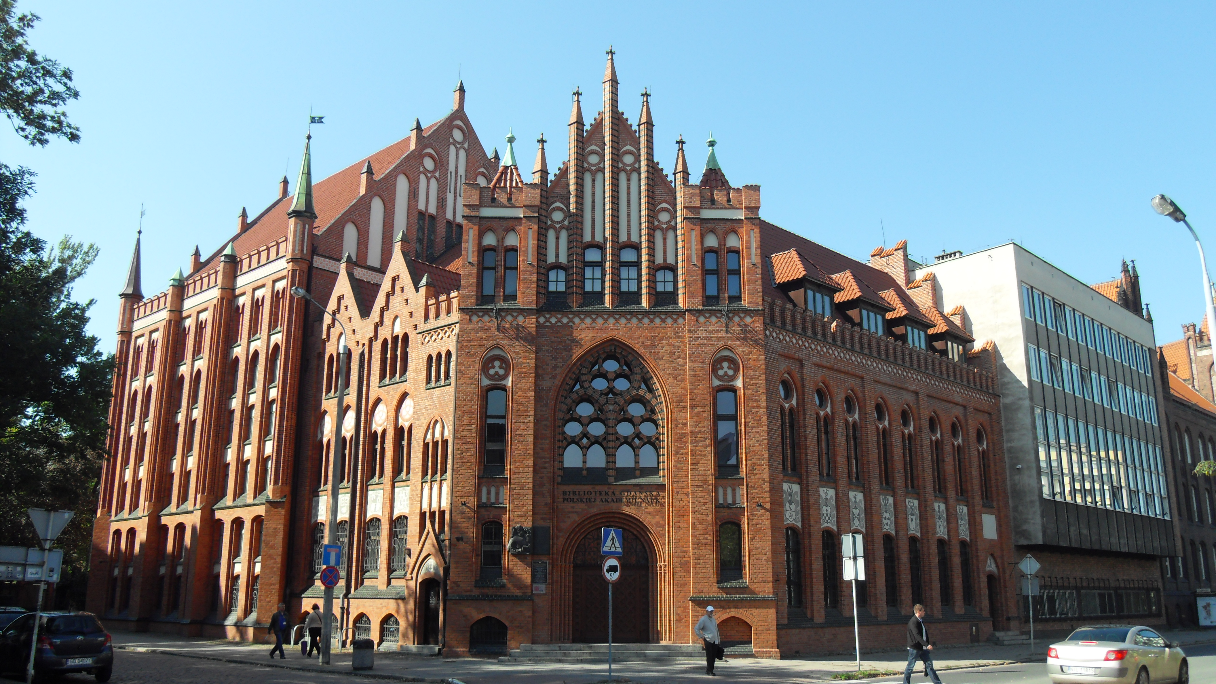 Gdańsk, ul. Wałowa 15 (dawna Biblioteka Miejska).